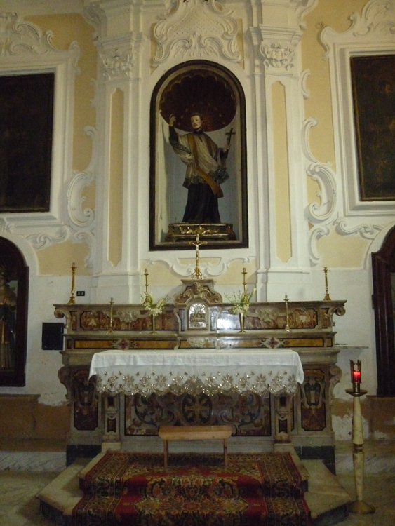 San Giovanni in Fiore - Chiesa Madre, cappella SS Sacramento